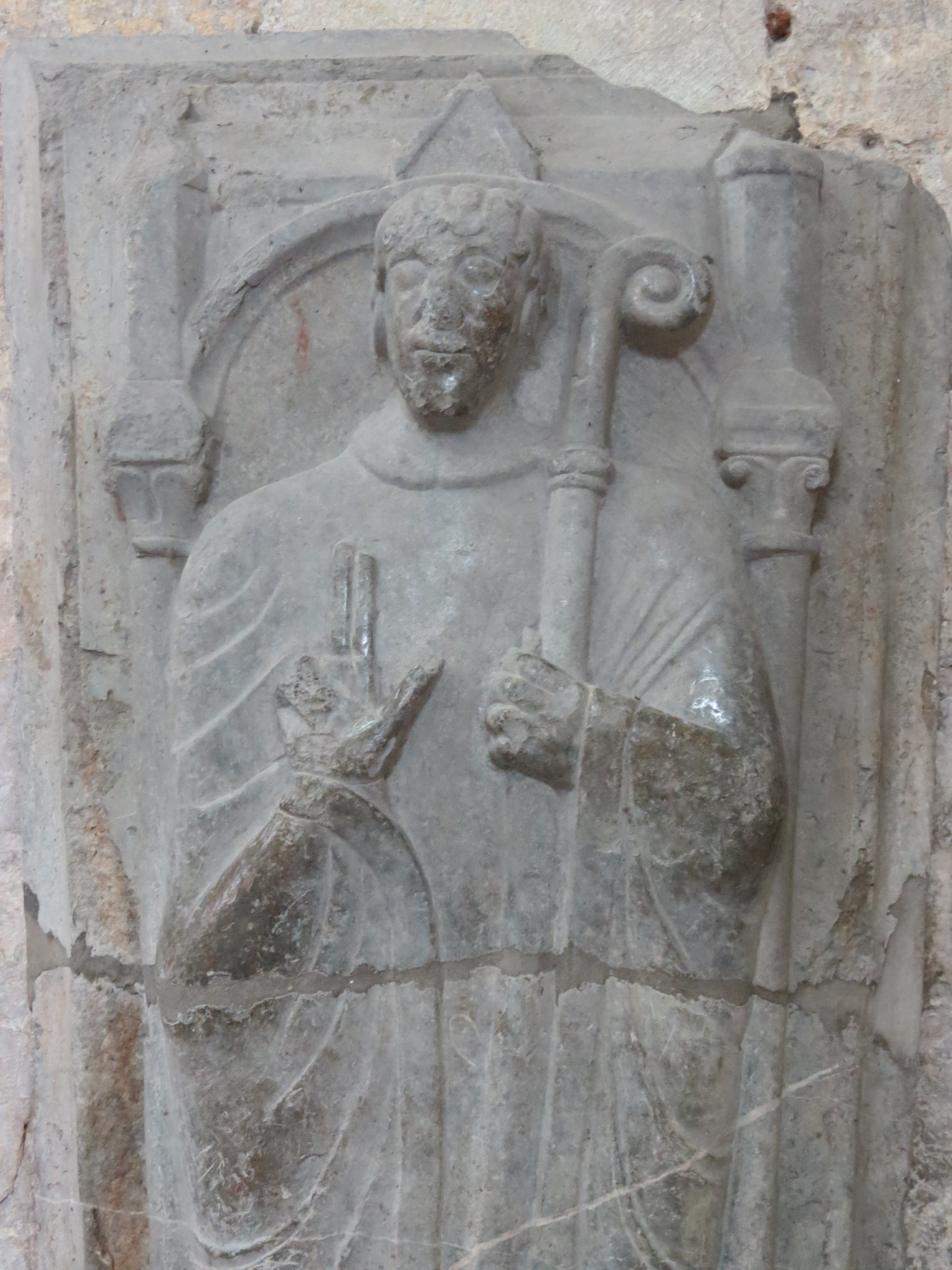 Détail du gisant de Jean Ier, évêque de Lisieux.